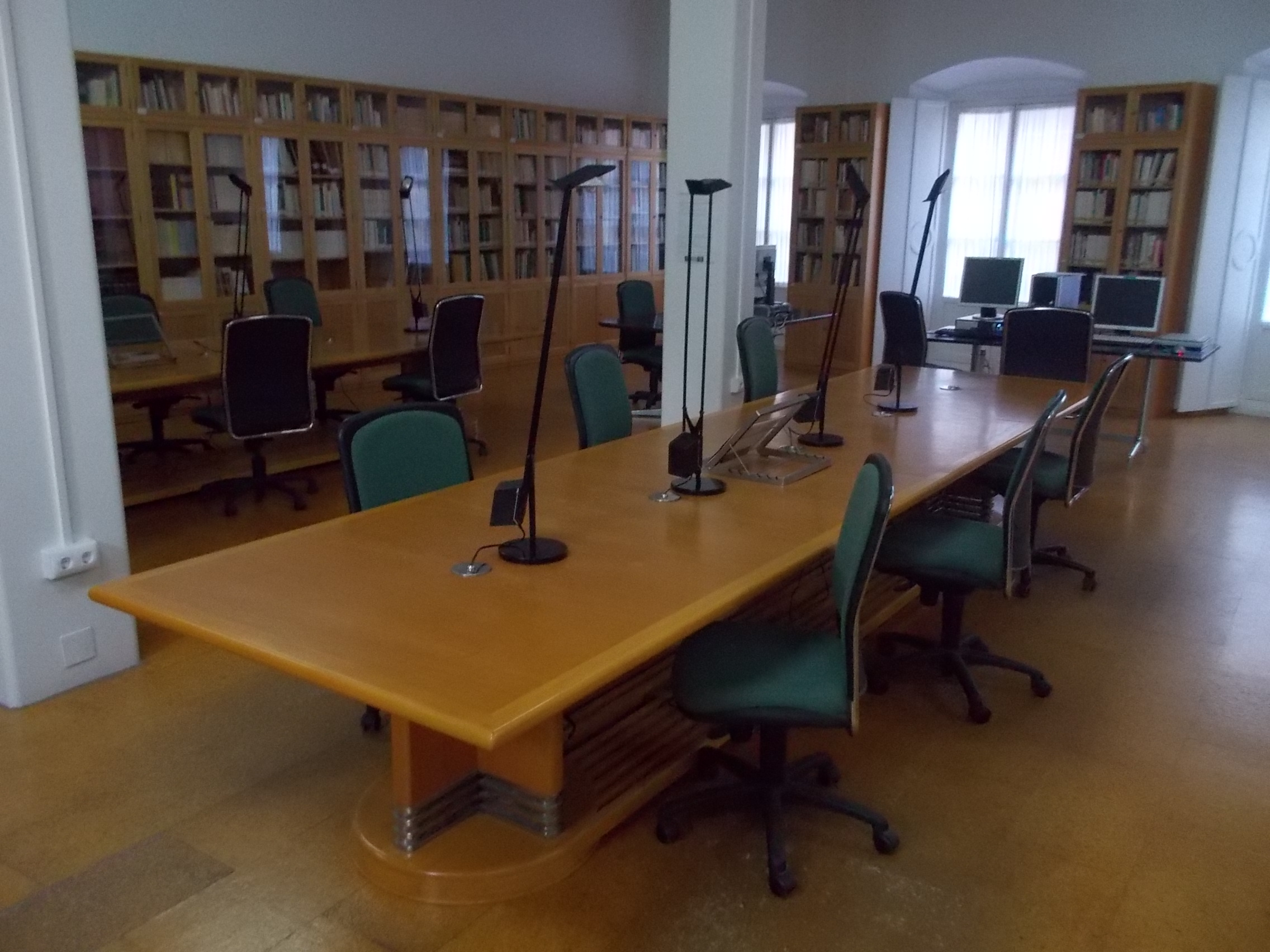 Sala de consulta del Archivo Histórico Provincial de Cádiz